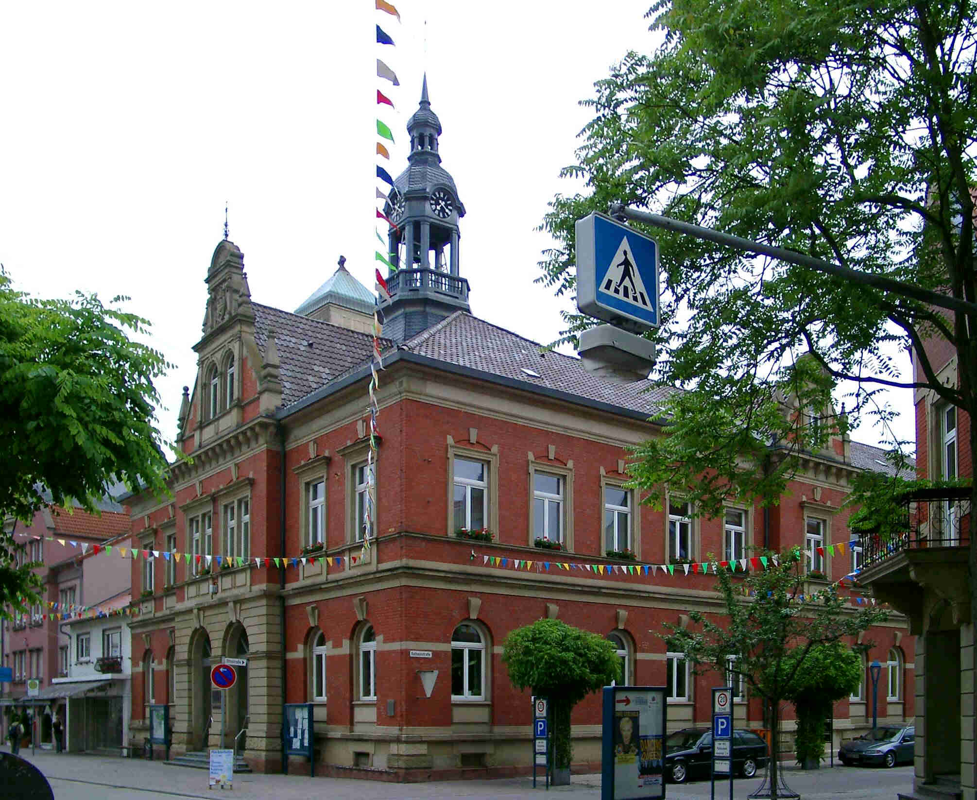 Hockenheim, Rathaus